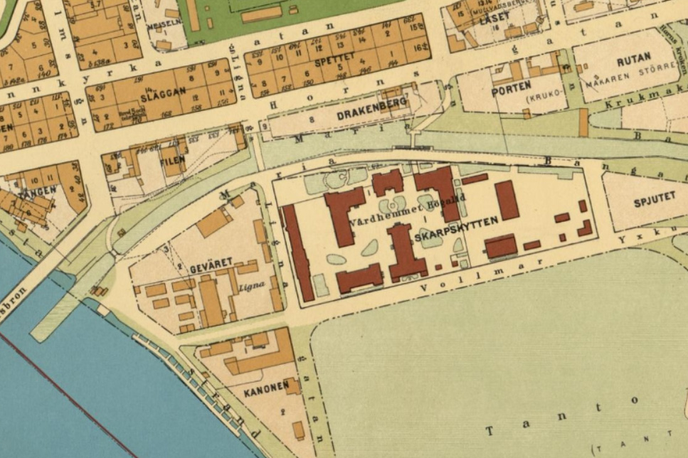 1930 års karta över Stockholm, del av Södermalm, ,Vårdhemmet Högalid